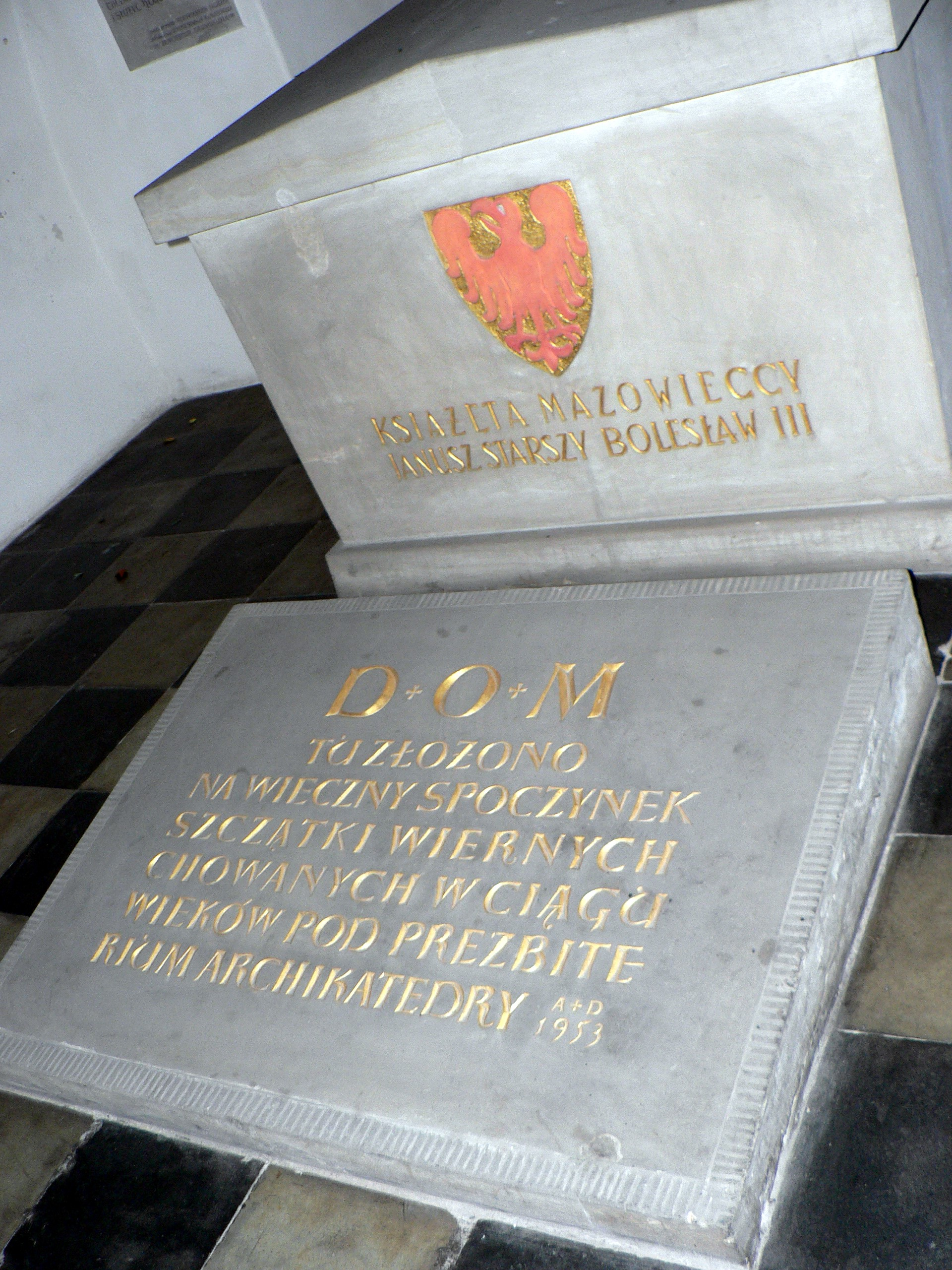 Krypta książąt mazowieckich w katedrze św. Jana w Warszawie